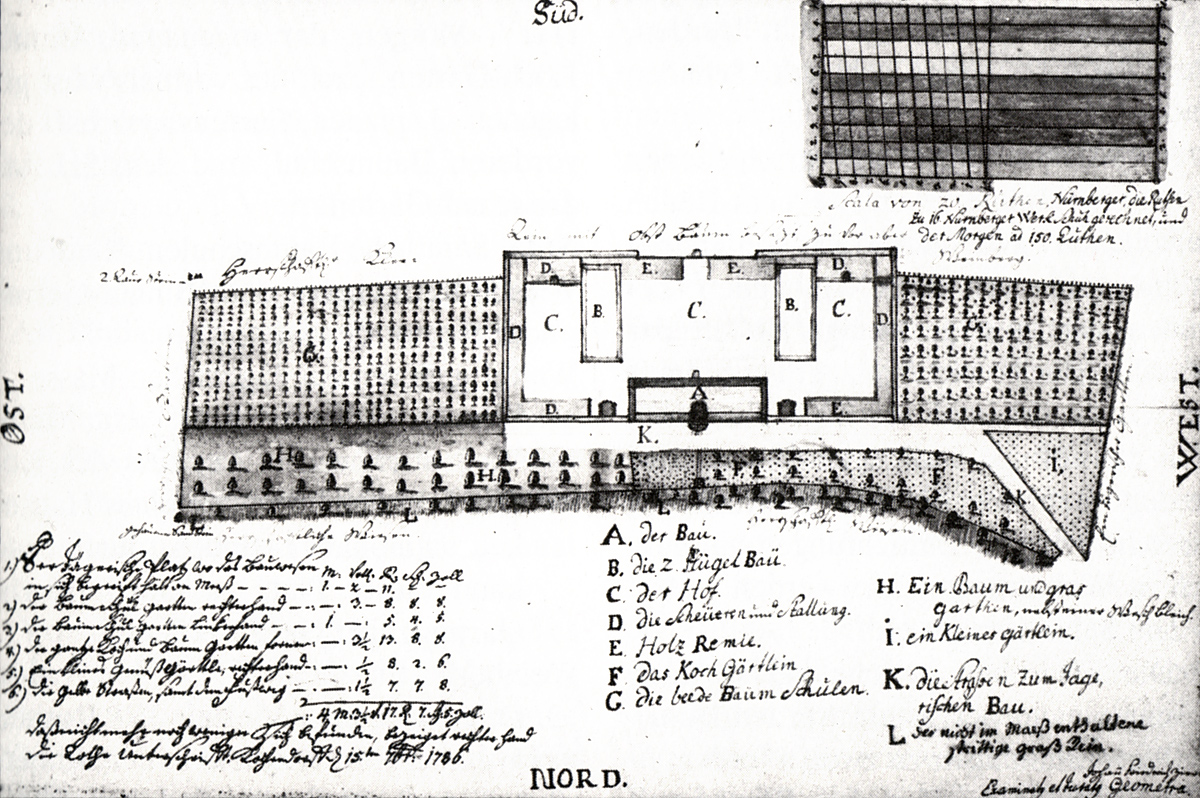 Lageplan des Syndikus Jägerschen Baus in Bad Friedrichshall-Kochendorf von 1786